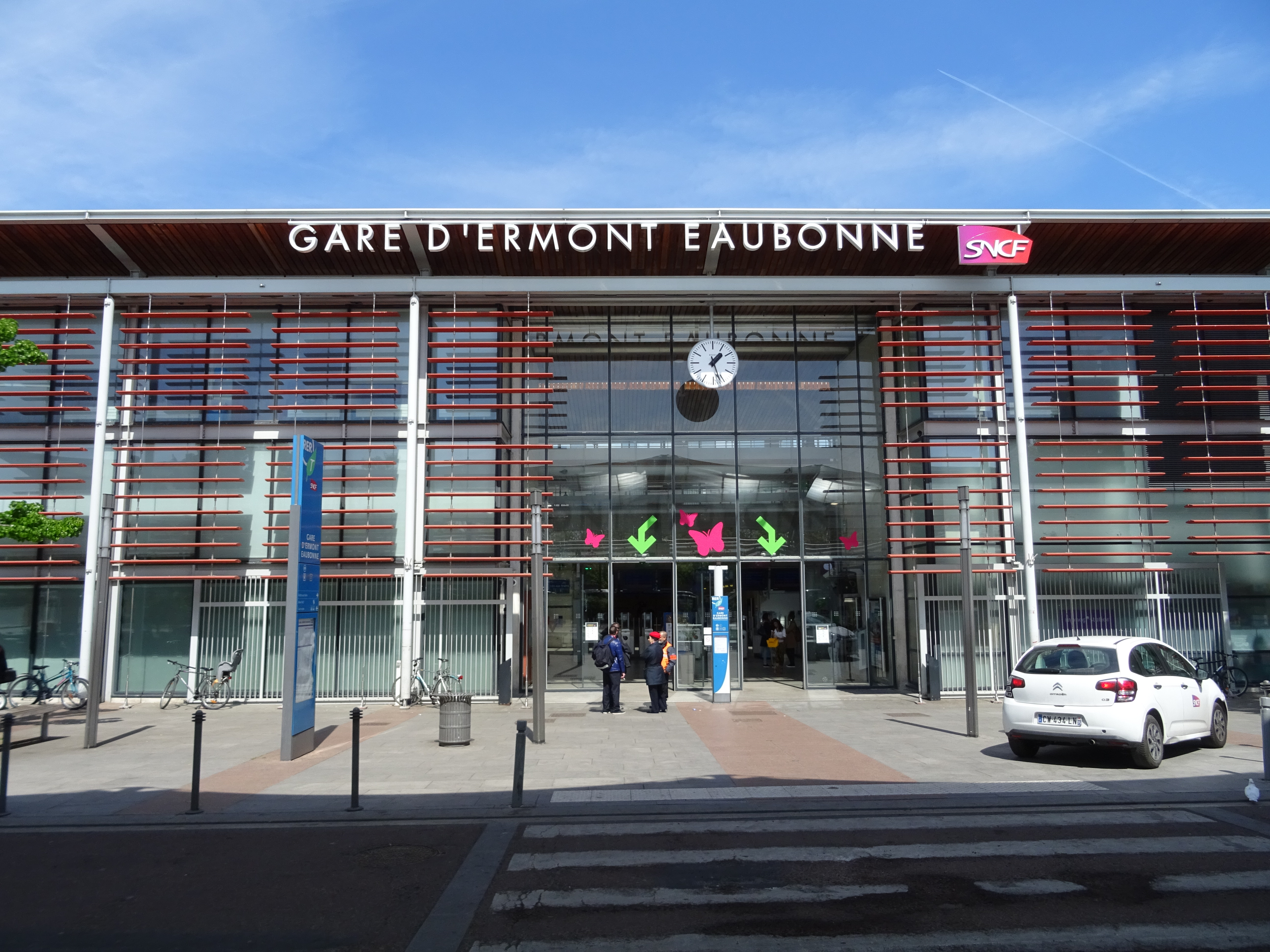 Bâtiment voyageurs gare Ermont Eaubonne